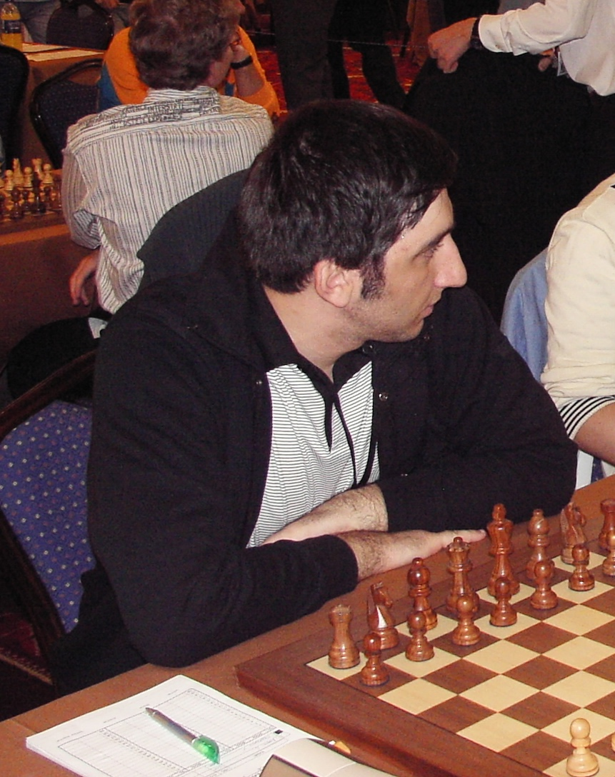 GM Vugar Gashimov Azerbaijan, EuroChess Iraklion 2007